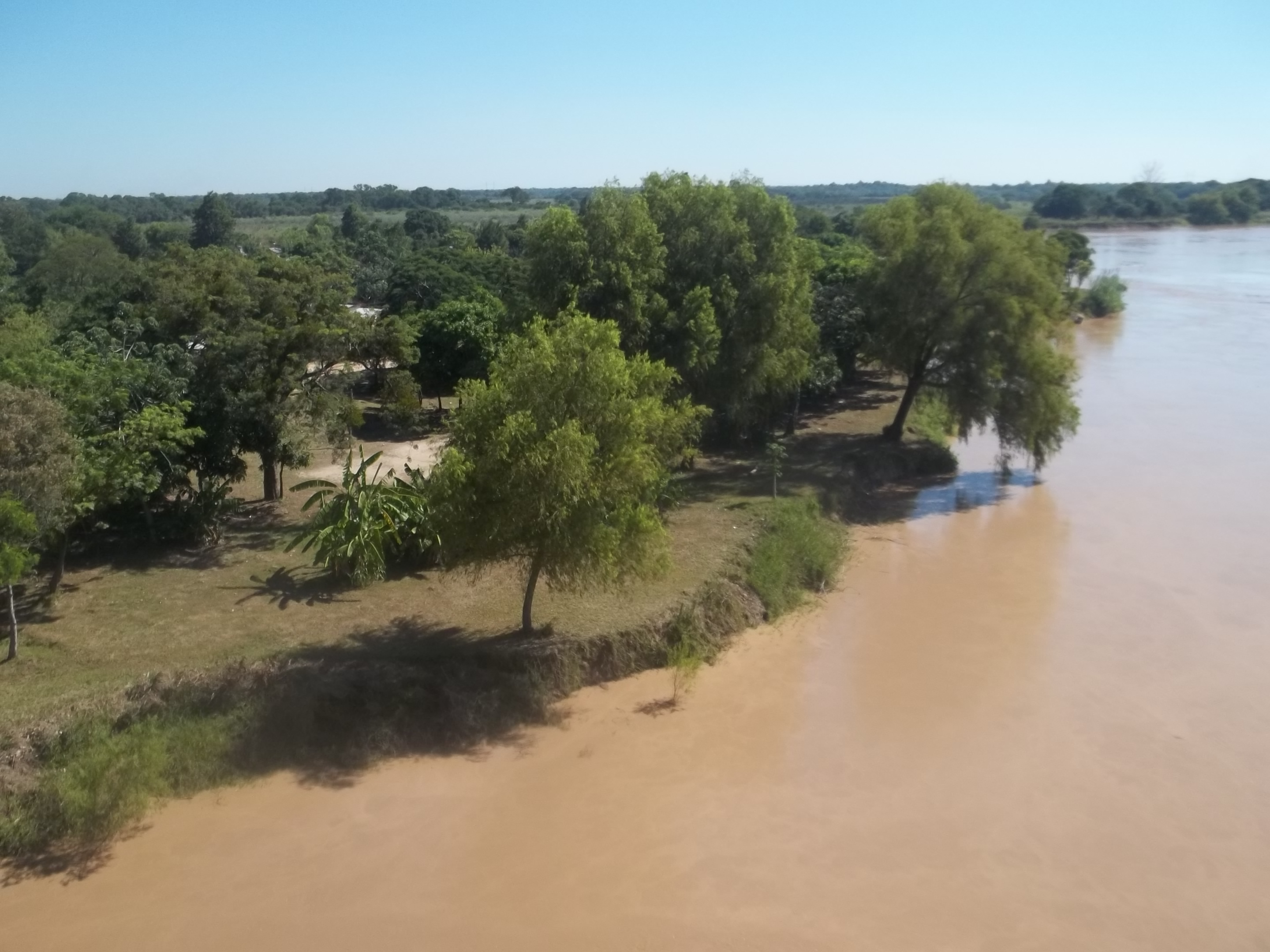 Vista desde el puente hacia el lado norte de la costa del río Bermejo en Puerto Eva Perón.